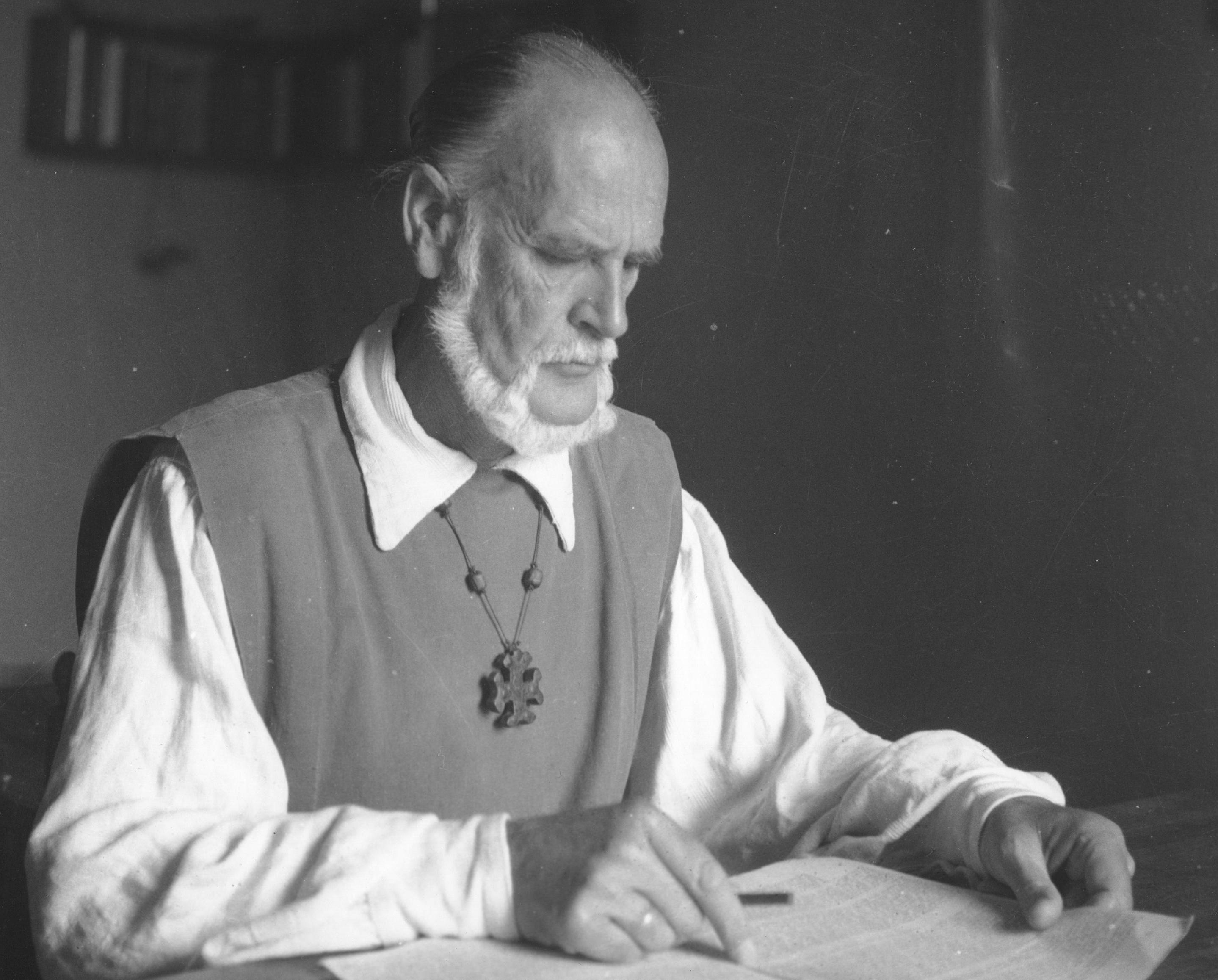 Lanza del Vasto